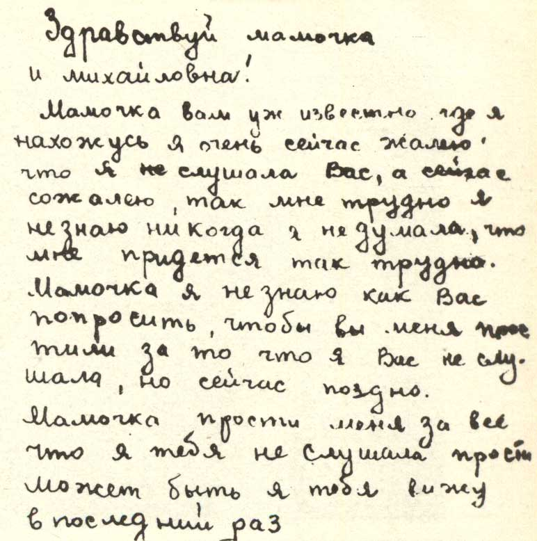 Прощальное письмо Любы Шевцовой, переданное матери из тюремной камеры. Фрагмент